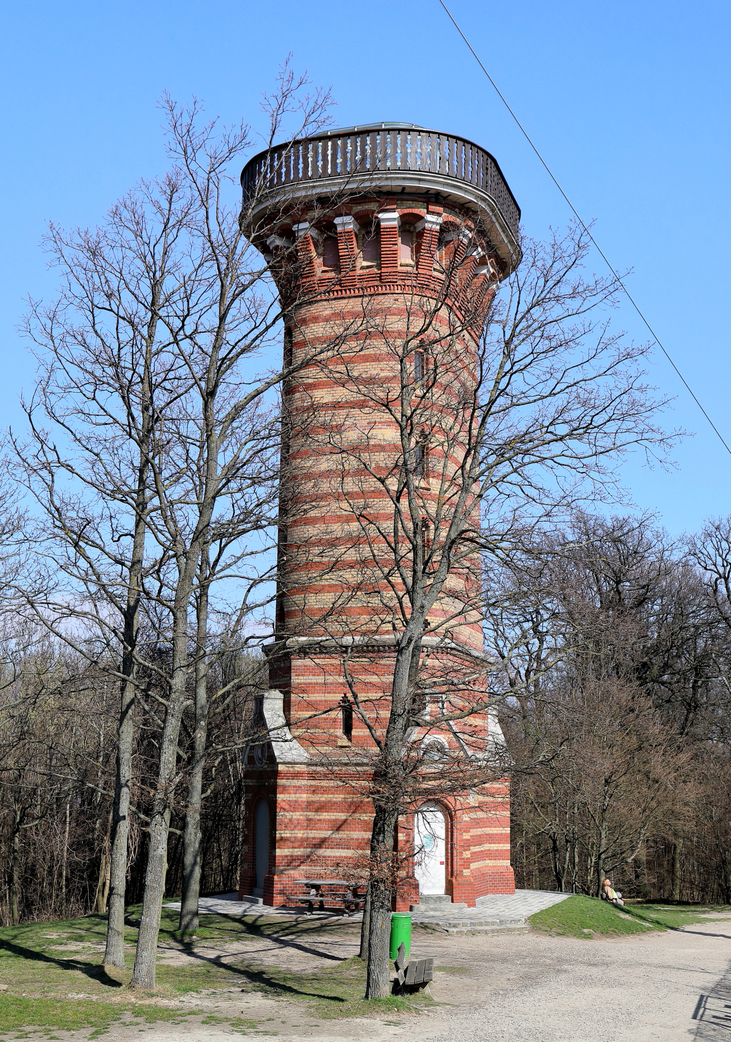 Westansicht der Stephaniewarte am 484 Metern hohen Gipfel des Kahlenberges im 19. Wiener Gemeindebezirk Döbling.Die 22 Meter hohe Aussichtswarte wurde nach Plänen des Architektenbüros Fellner & Helmer im Auftrag der Kahlenberg-Eisenbahn-Gesellschaft an der Endstation der Kahlenbergbahn errichtet und am 29. Mai 1887 unter der Bezeichnung „Kronprinzessin Stephanie-Warte“ eröffnet. Aktuell (2018) wird sie vom Touristenverein „Die Naturfreunde" betreut und ist in den Sommermonaten am Wochenende zugänglich.